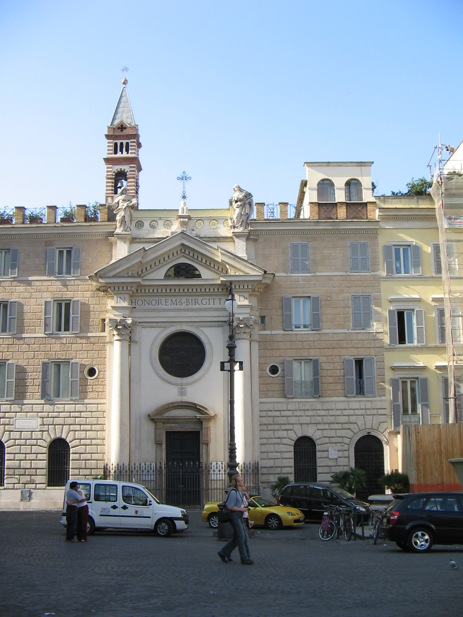 Piazza Farnese in Rome: Chiesa di Santa Brigida. 16/X/2005.